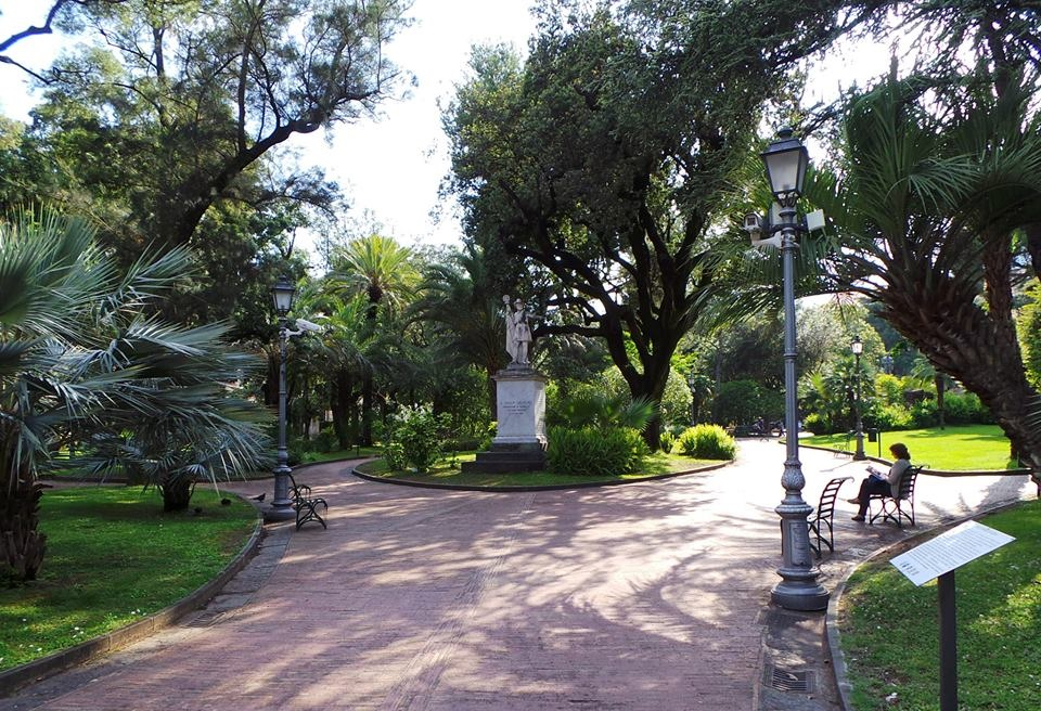 villa comunale di salerno